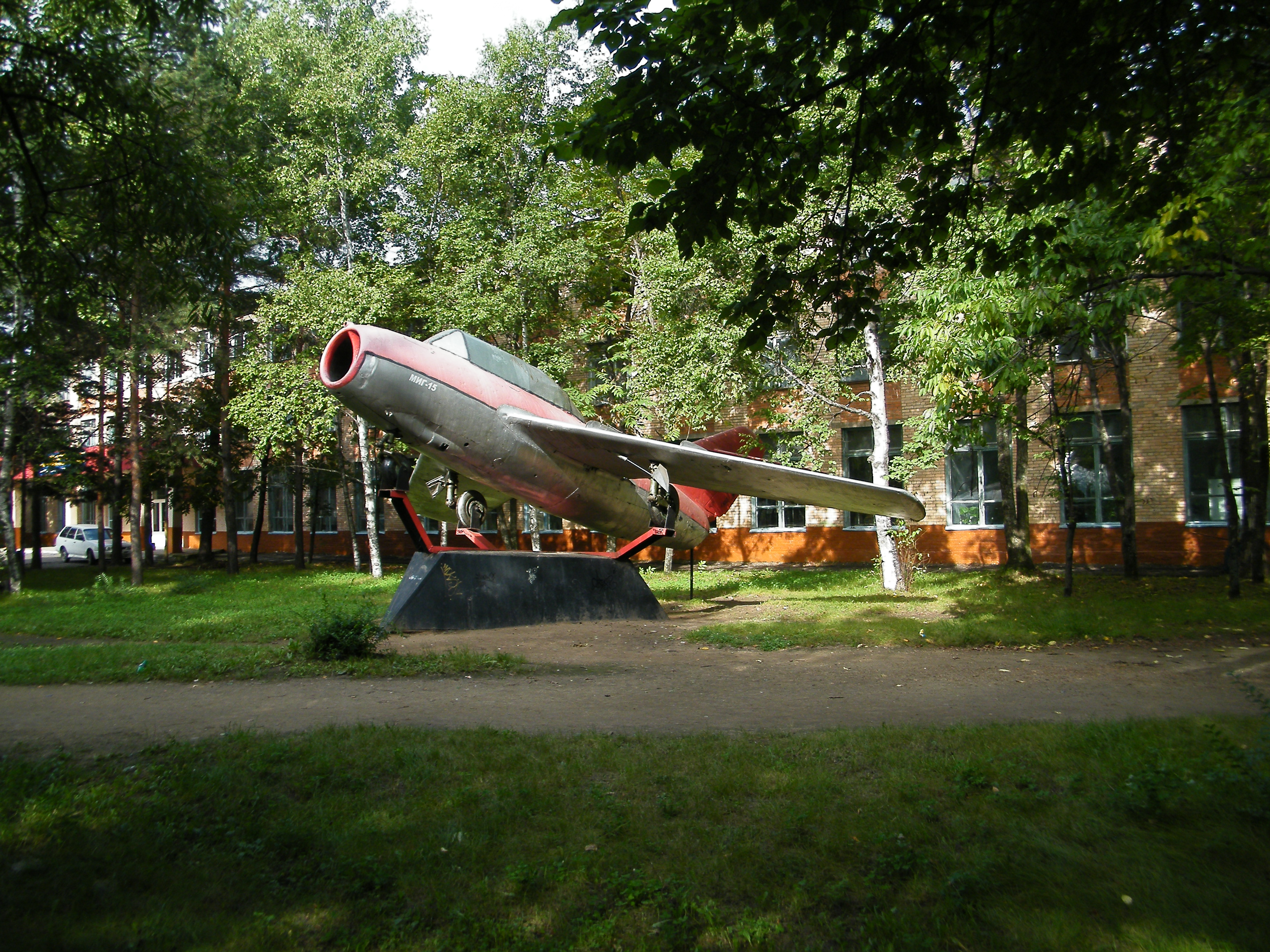 Самолет МИГ-15 возле здания Приморского авиационного техникума